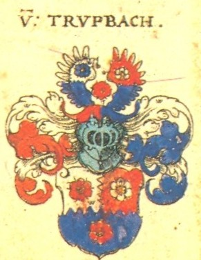 Wappen des fränkischen Adel- und Rittergeschlechts Truppach.